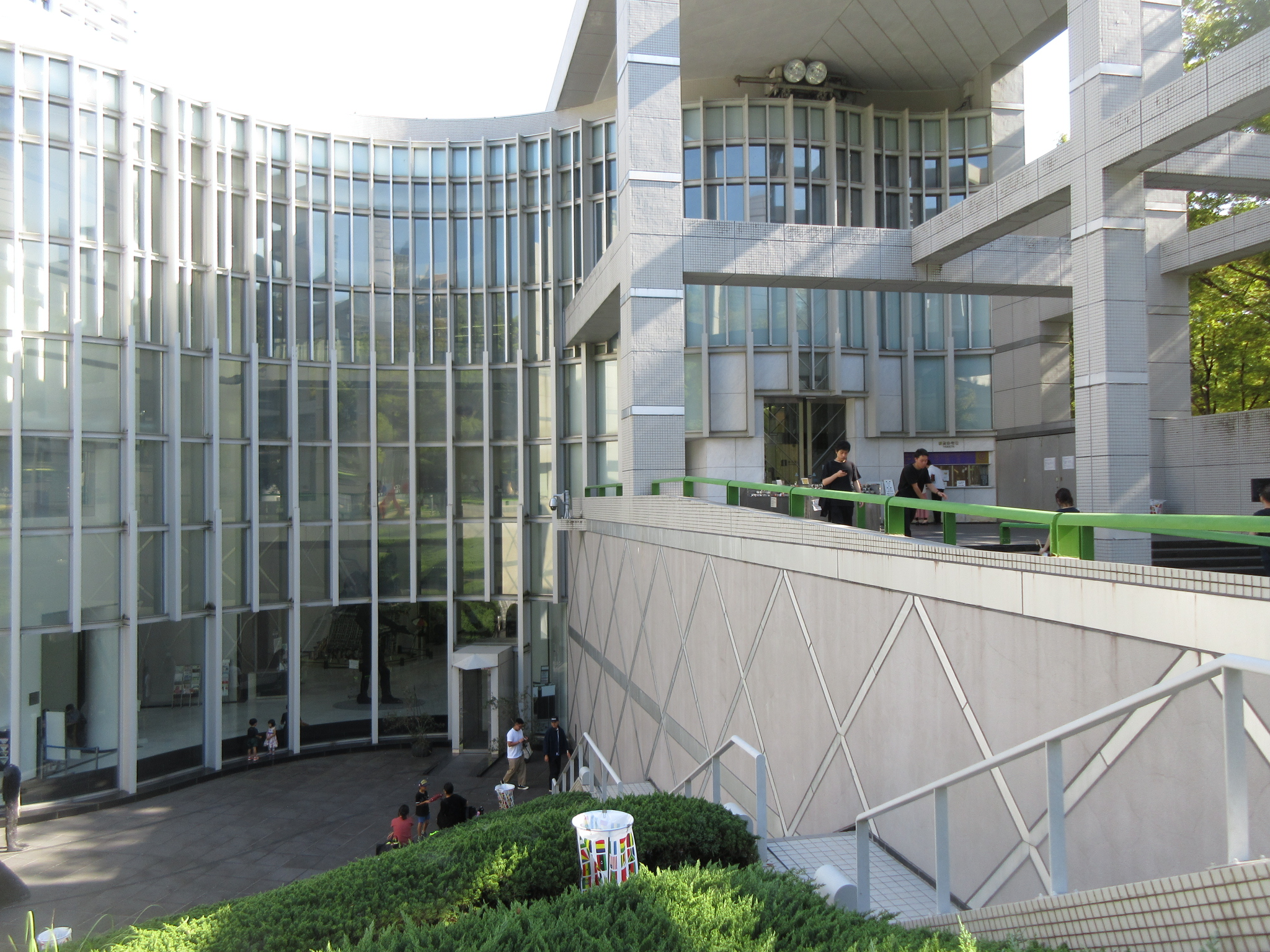 名古屋市美術館（名古屋市中区栄）